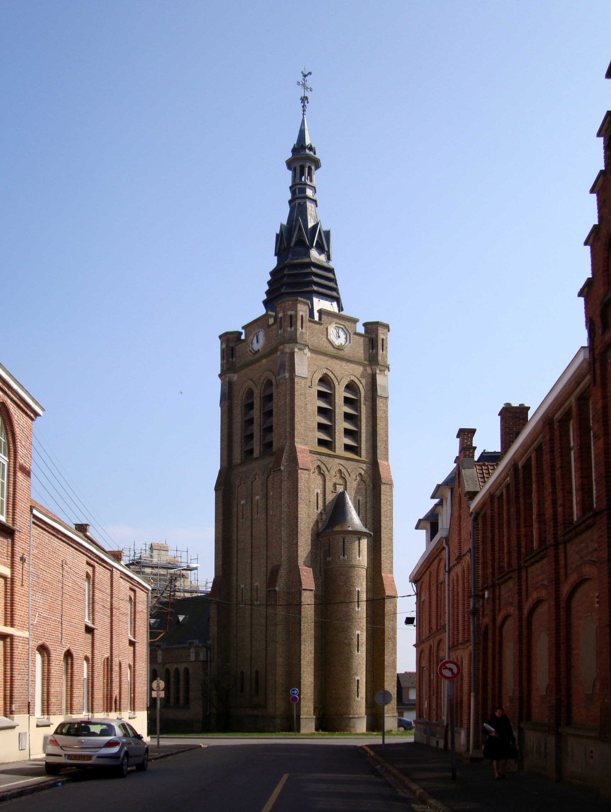 Le clocher de l'église Saint-Amand construite dans un style néo flamand par l'architecte René Dupire en 1931 à Bailleul (Nord).